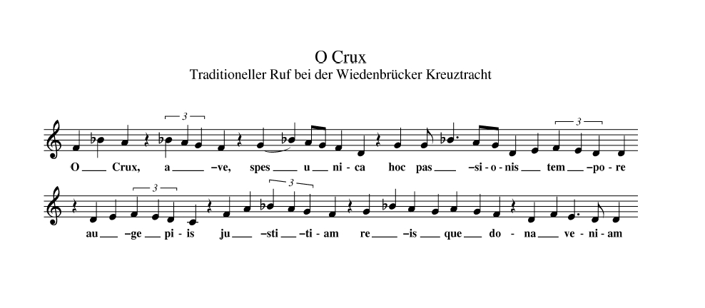 "Karfreitags-Prozession in Wiedenbrueck: Notenblatt O Crux"